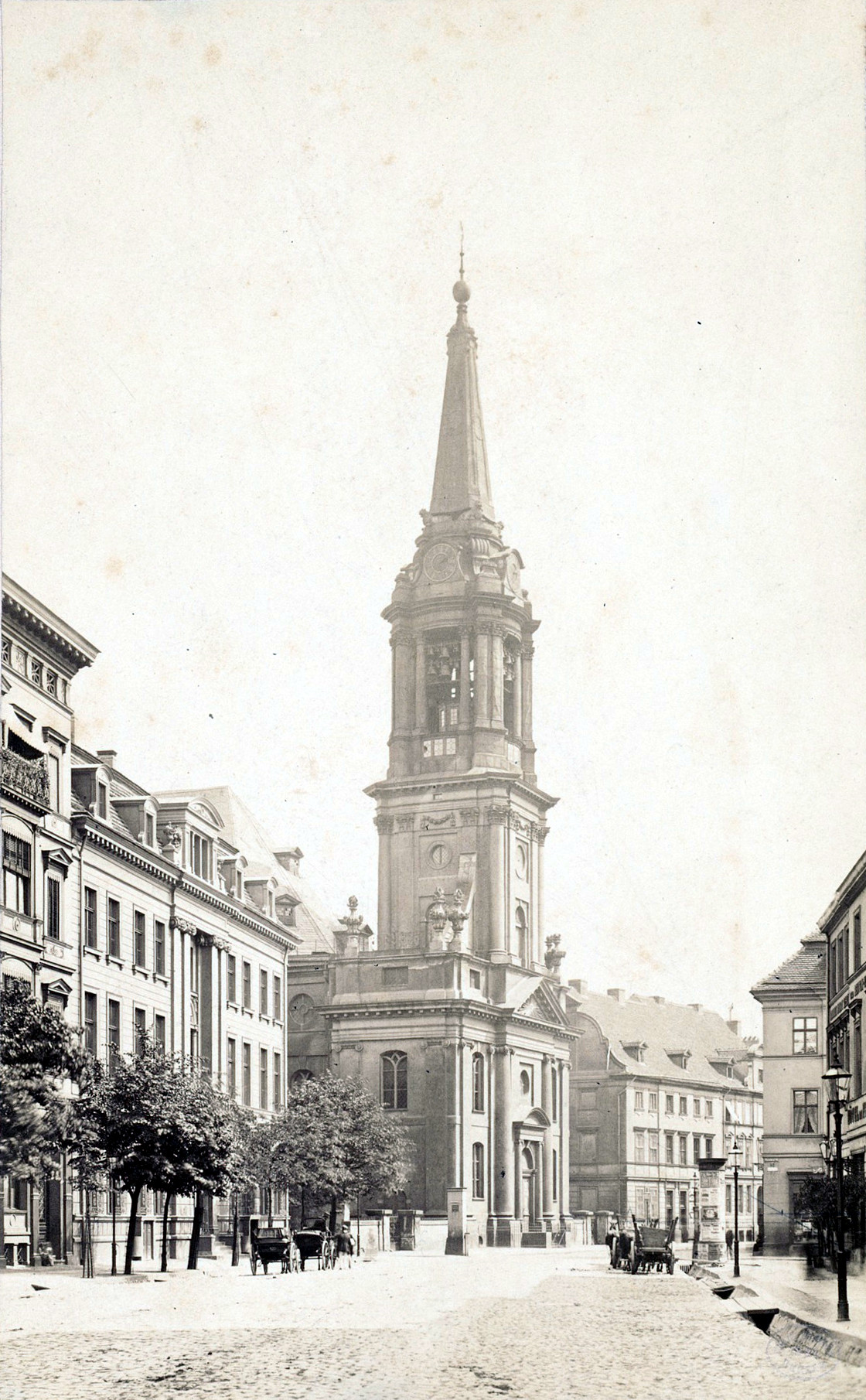 Parochialkirche, Berlin